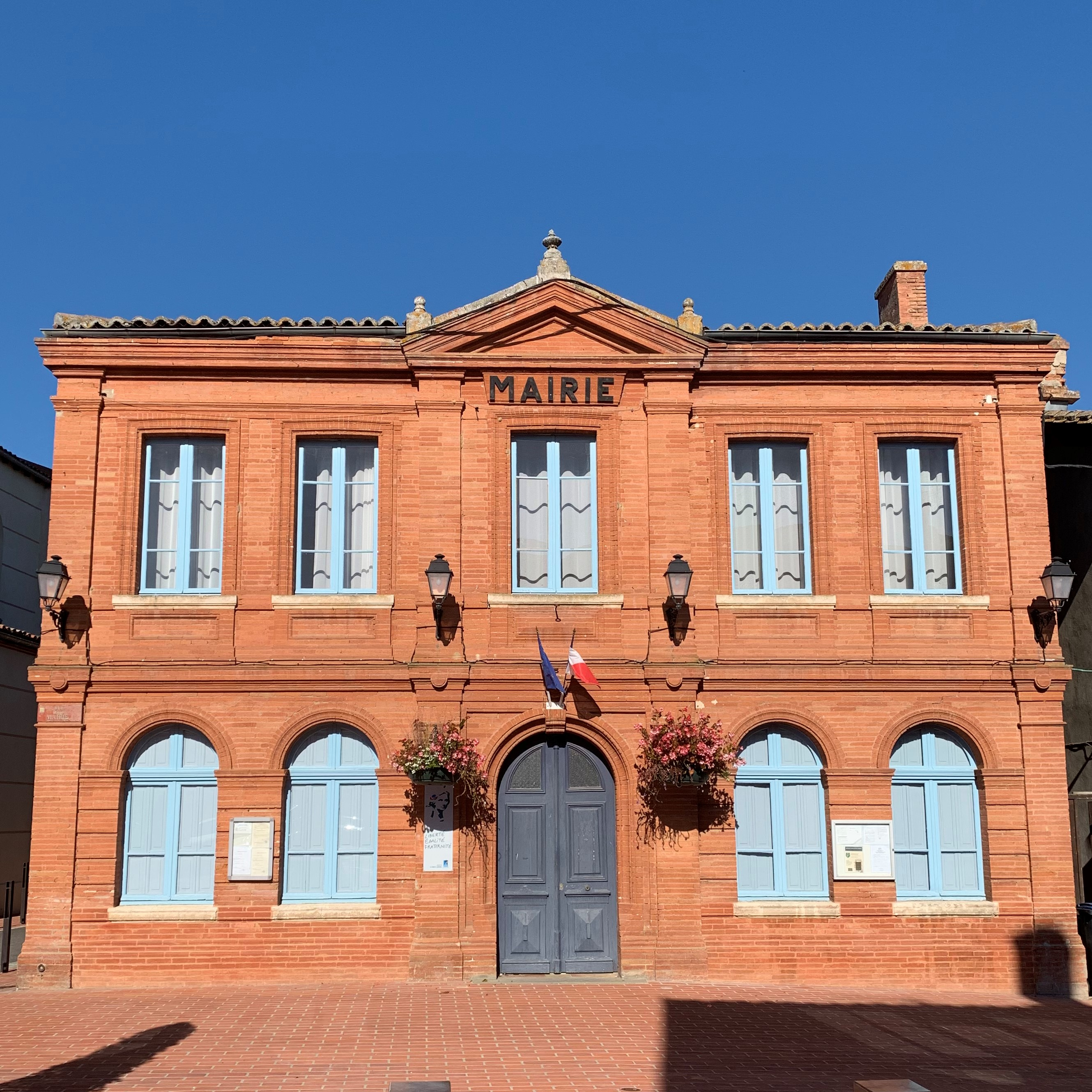 Mairie et église de Lévignac (Haute-Garonne)